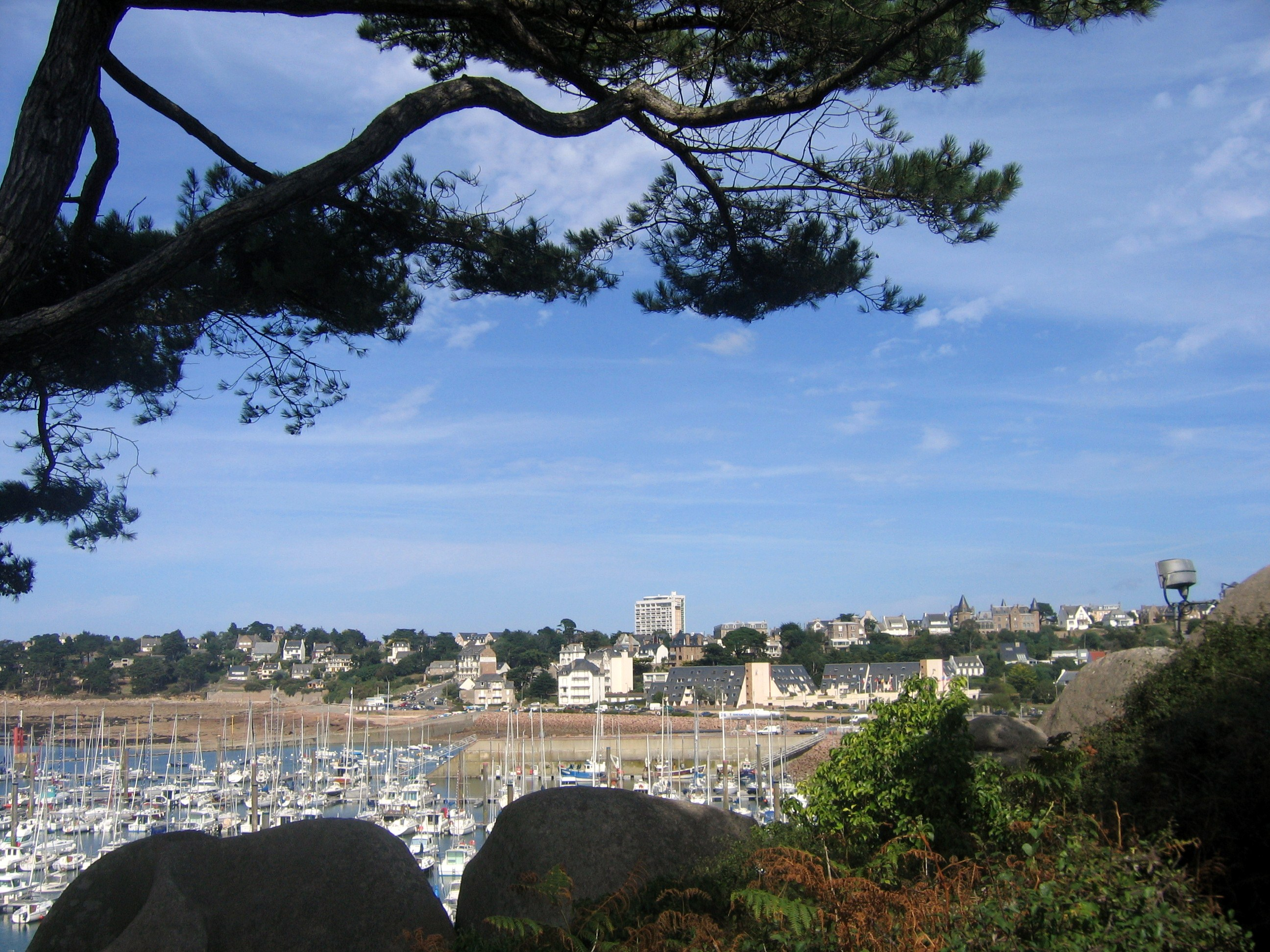 La Résidence Hélios Trébeurden surplombant la marina dans les Côtes-d'Armor Bretagne .